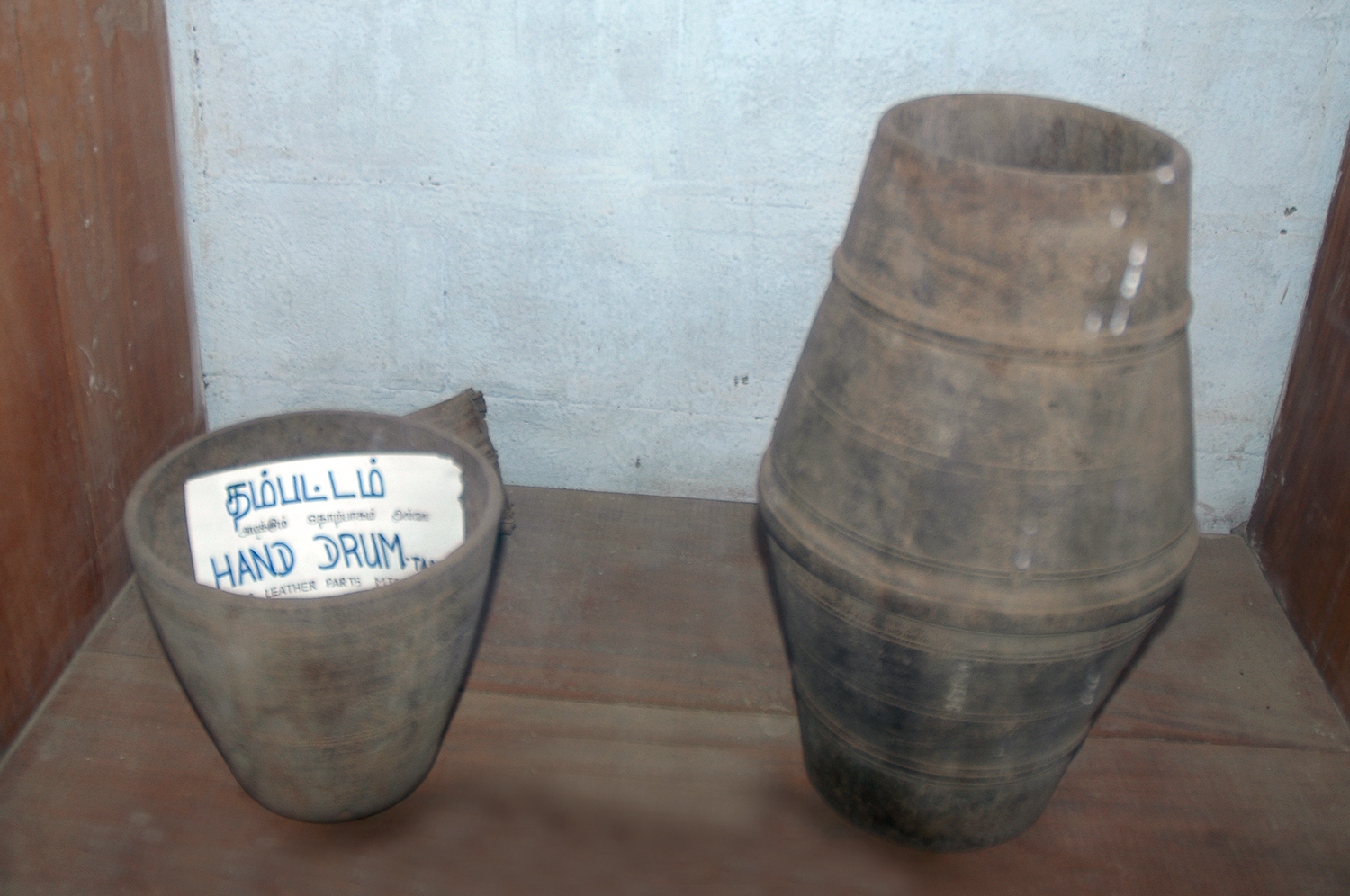 மிருதங்கம் - தொல் பொருட்காட்சிச்சாலை, யாழ்ப்பாணம்